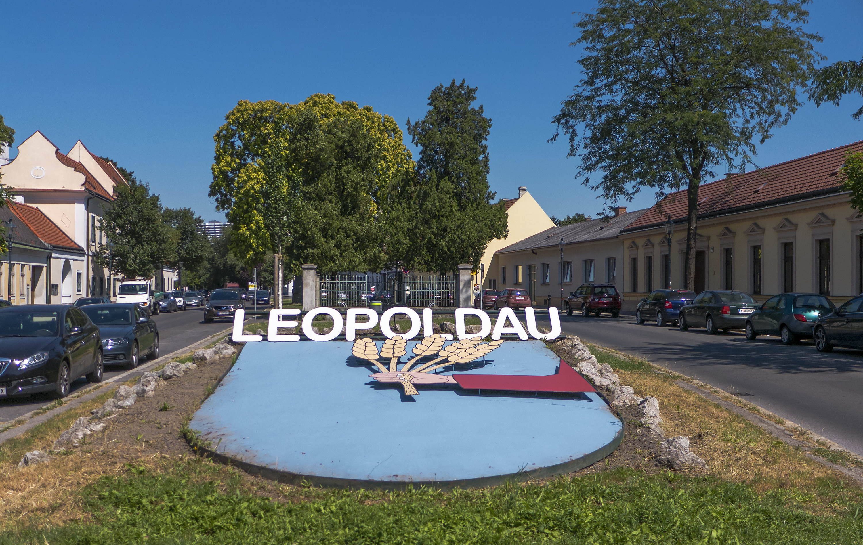 Leopoldauer Platz in Wien 21